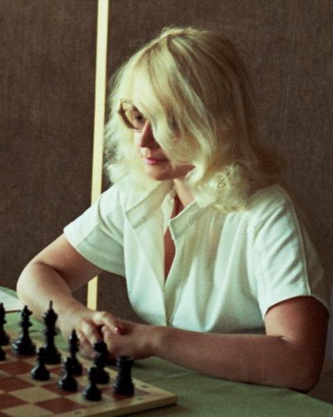 Hanna Erenska-Barlo 1982 in Bad Kissingen